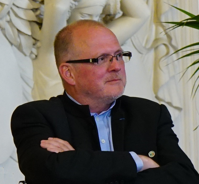 Lors du colloque international de la paix en l'hôtel de ville de Reims. Peter Lechenauer consul de France à Salsbourg.